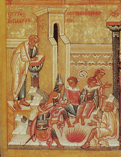 Отречение апостола Петра. Фрагменты двусторонних таблеток. Конец XV - начало XVI в. Четырехчастная икона, Новгород